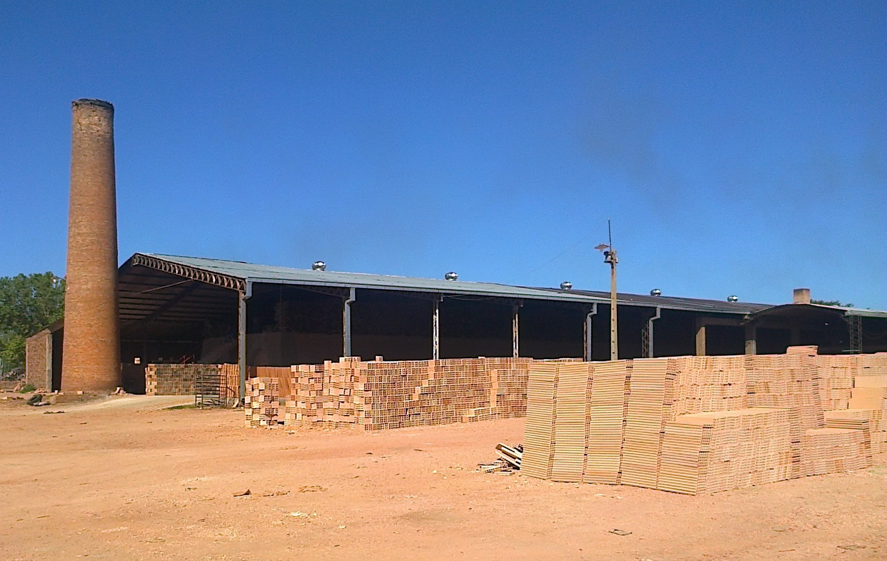 Aspecto que presentaba la Cerámica Itauguá en diciembre de 2013.